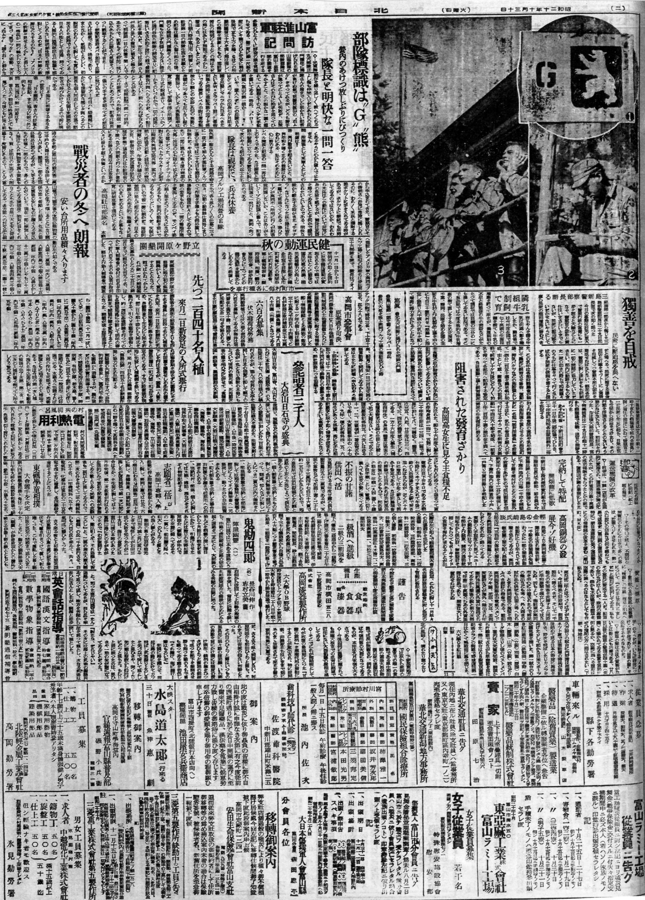 富山県下に占領軍進駐